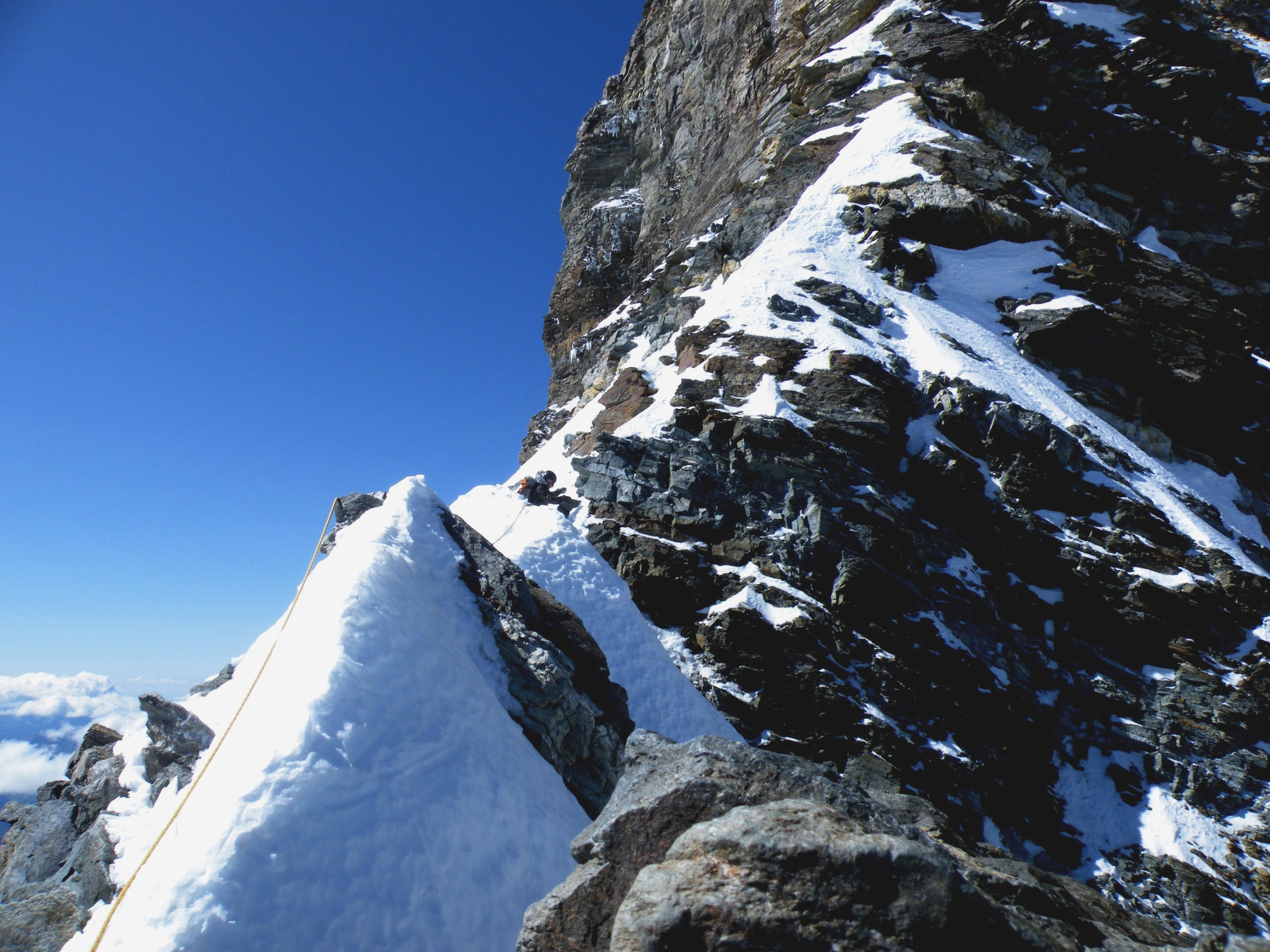 Kiipeilijä laskeutumassa kupolilta Hörnli harjanteelle